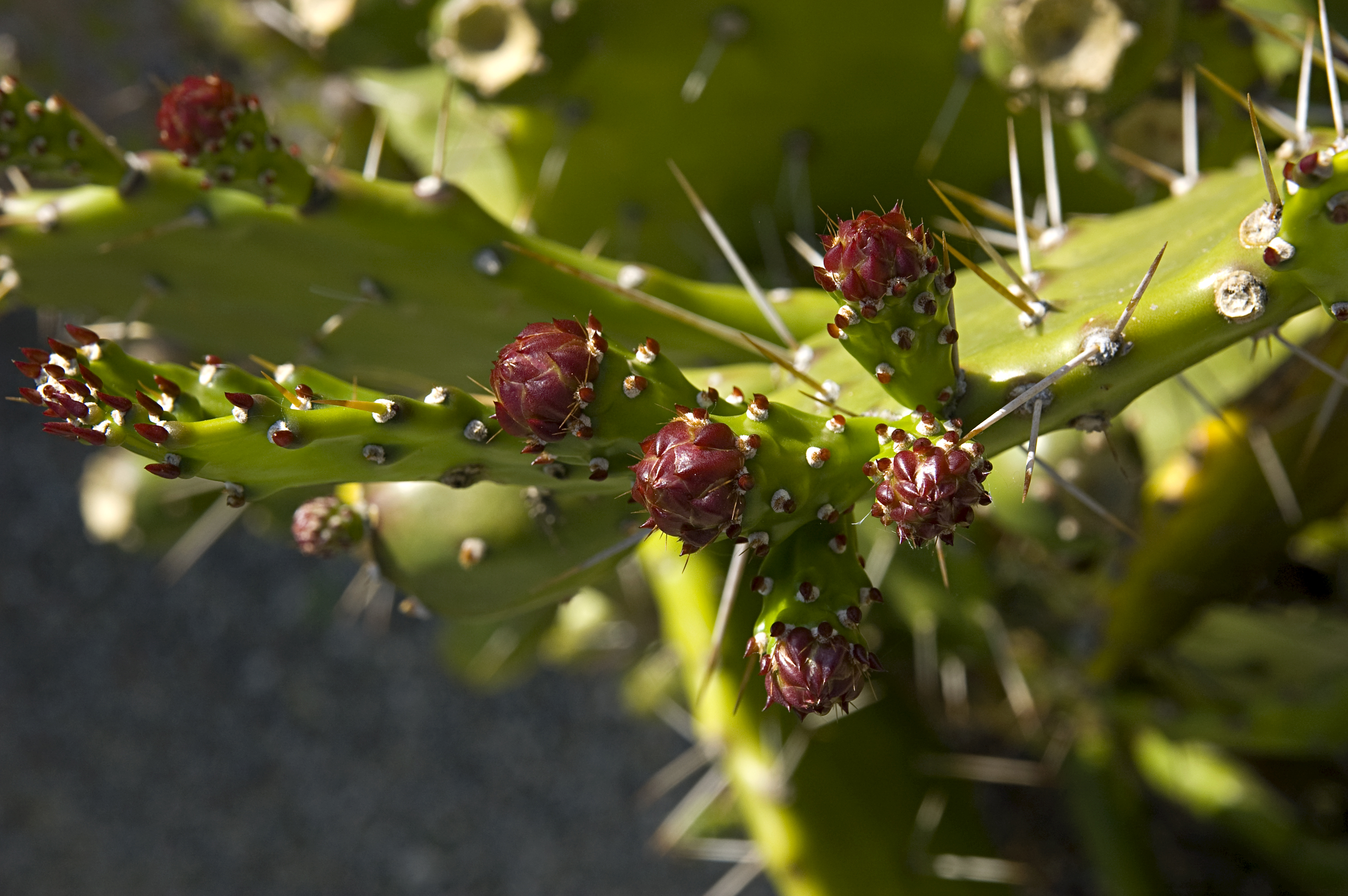 Kaktusblüte im Bastionsgarten von Eichstätt - Original size